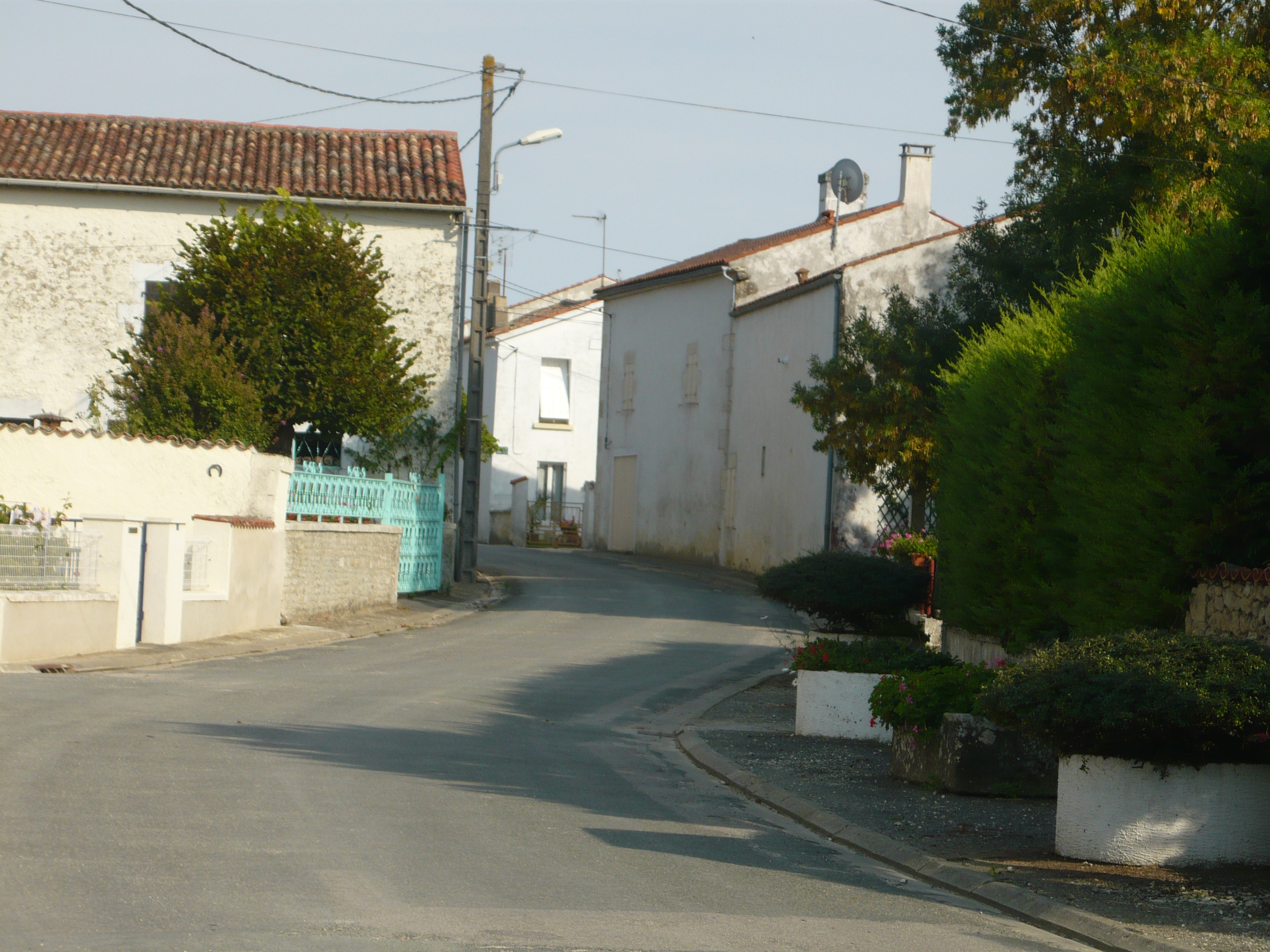 La rue principale dans le village de Migré (17)